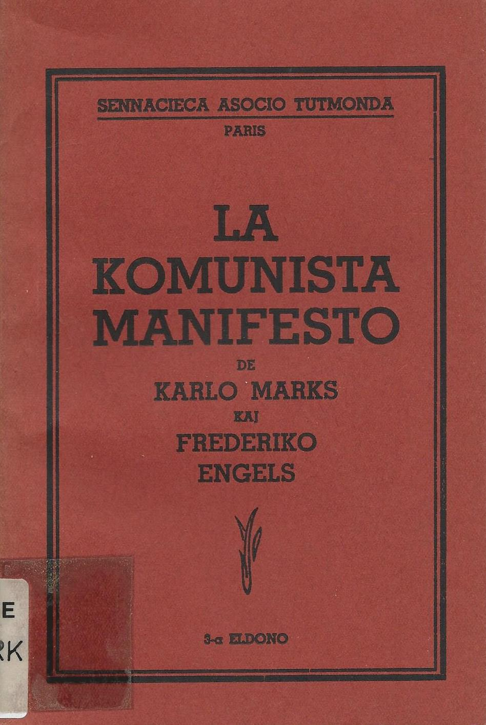 librokovrilo de "La Komunista Manifesto", 1936